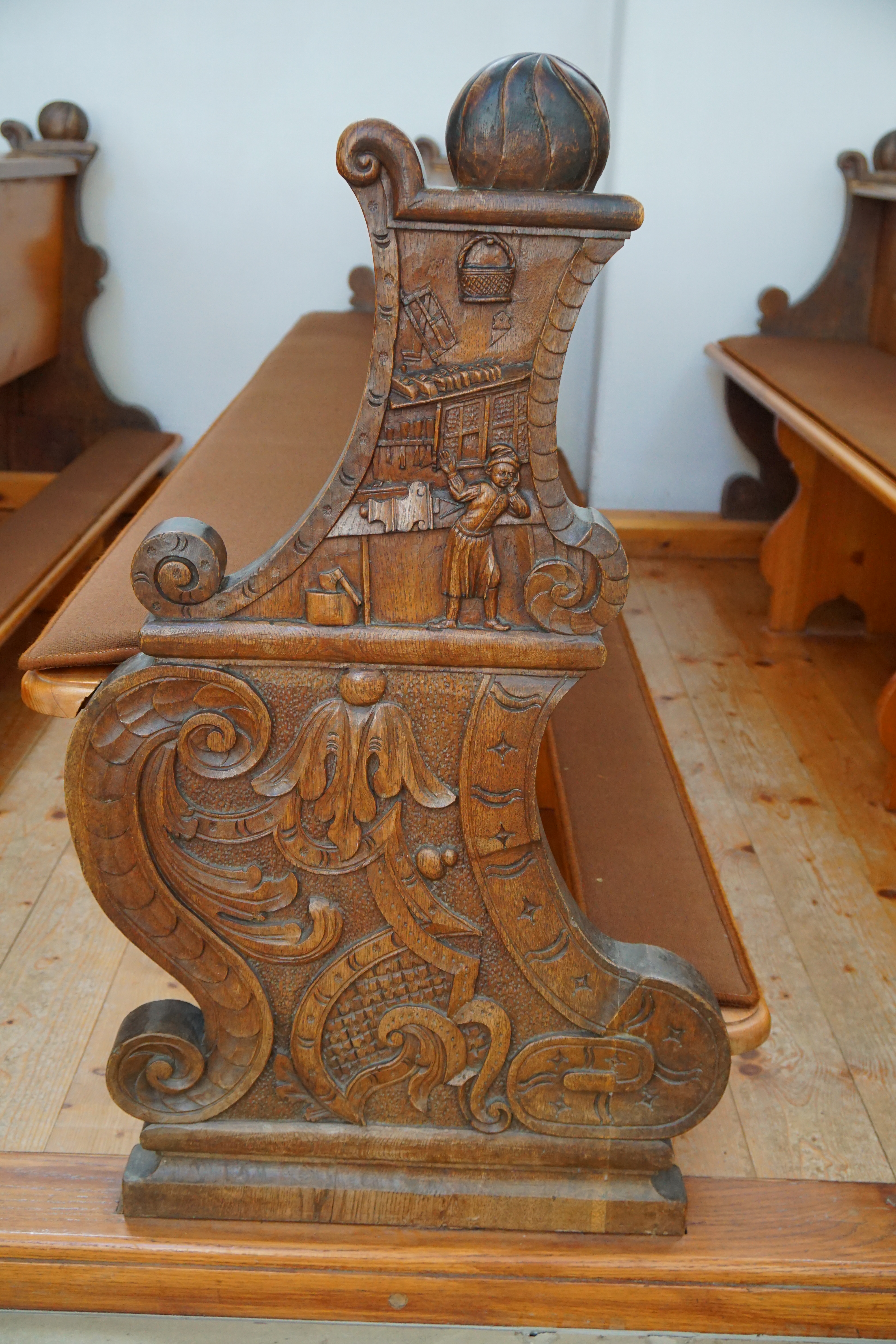 Klosterkirche des Klosters Kirchberg.